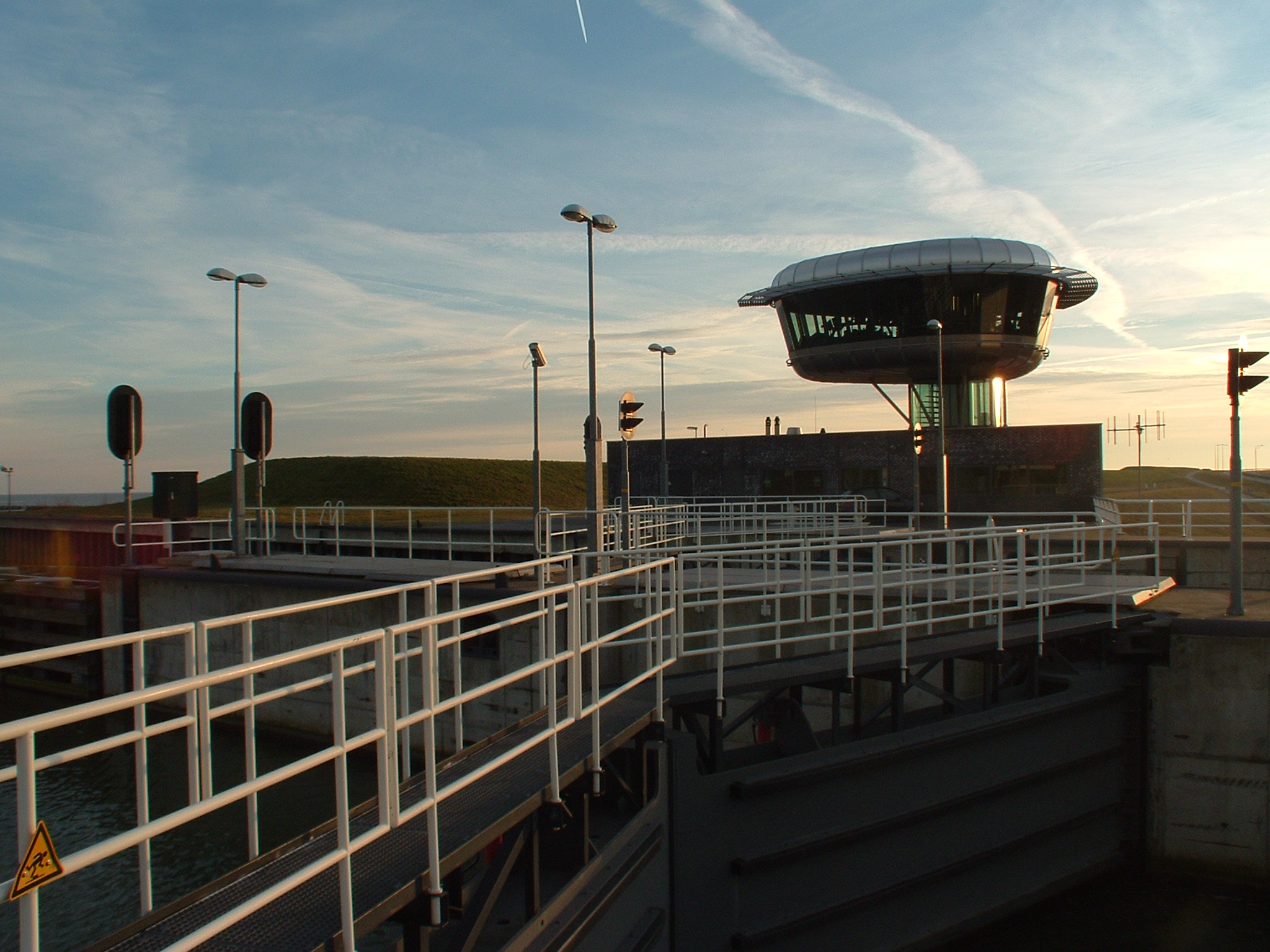 Naviduct in de Houtribdijk te Enkhuizen Foto: M.P. Tillema